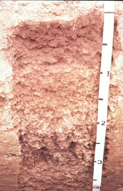 Miami soil profile